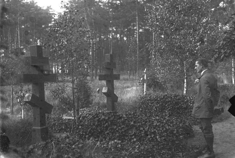 Der Friedhof der Namenlosen! Abseits vom Getriebe der Grosstadt im Grunewald bei Berlin befindet sich der Selbstmörderfriedhof. Hier werden die an den Klippen des irdischen Lebens Zerschellten und freiwillig in den Tod gegangenen beigesetzt. Gräber von Selbstmördern orthodoxischen Glaubens auf dem Friedhof der Selbstmörder im Grunewald bei Berlin.